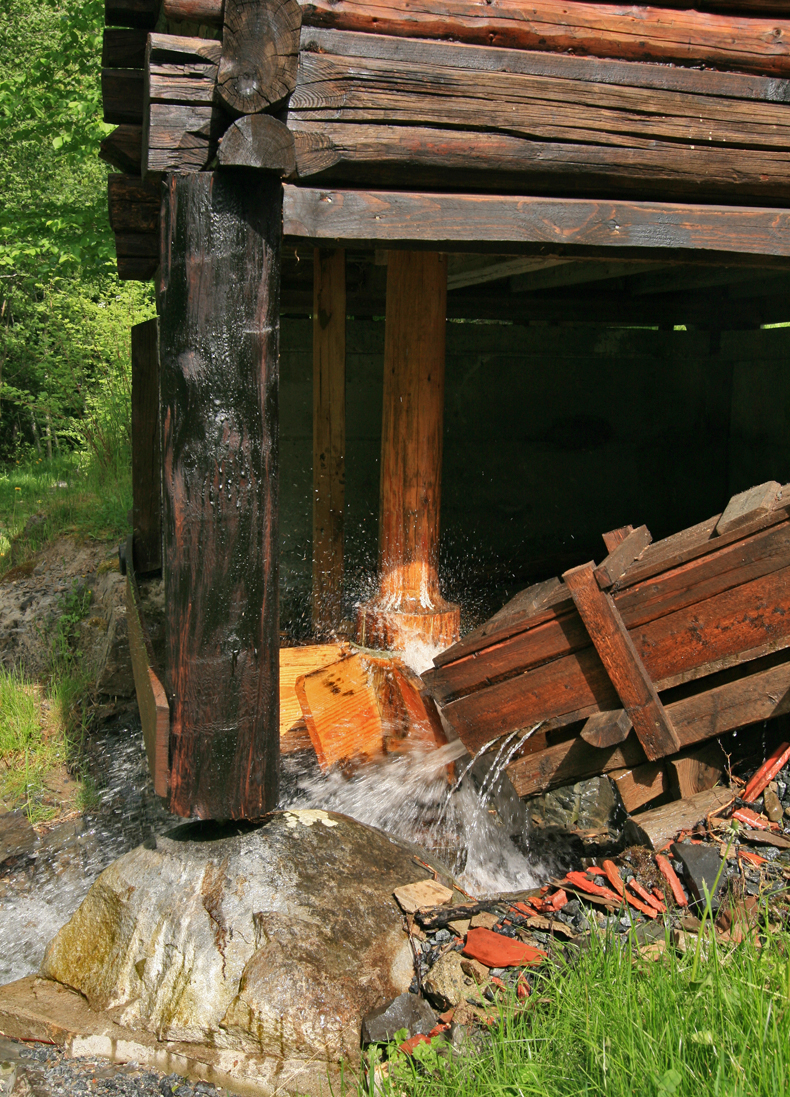 Detalj av bekkekvern på Kjerratmuseet, Åsa, Ringerike.